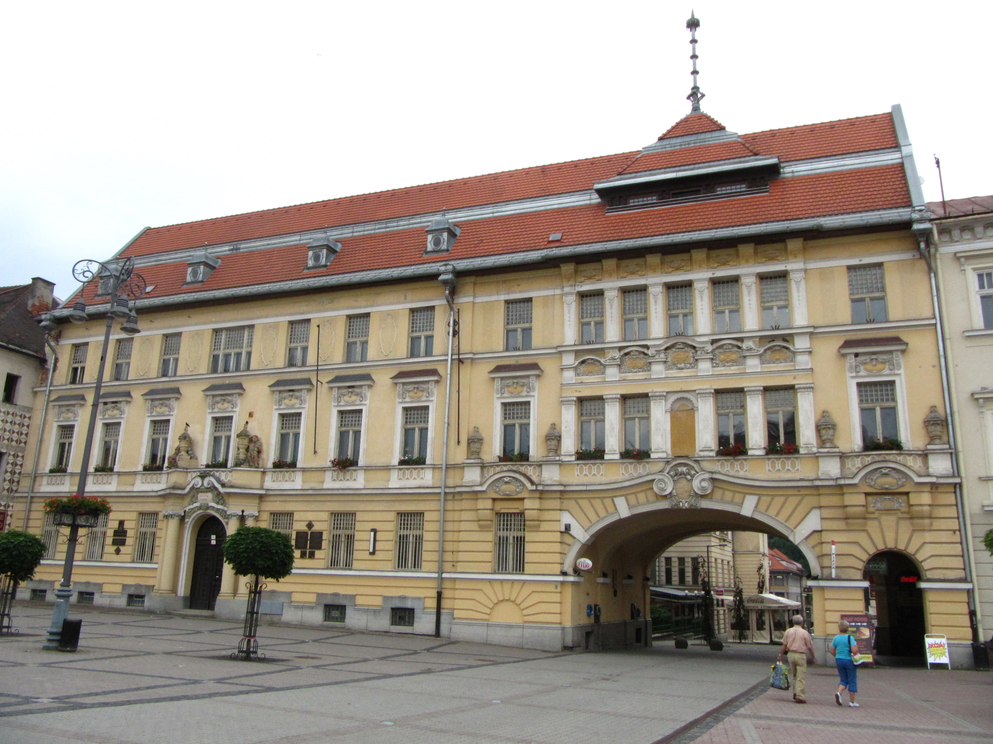 Generálne riaditeľstvo Lesov Slovenskej republiky v Banskej Bystrici.